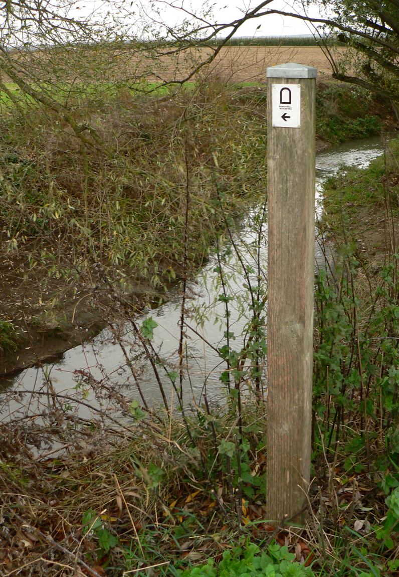 Römerkanal-Wanderweg Schild bei Lüftelberg